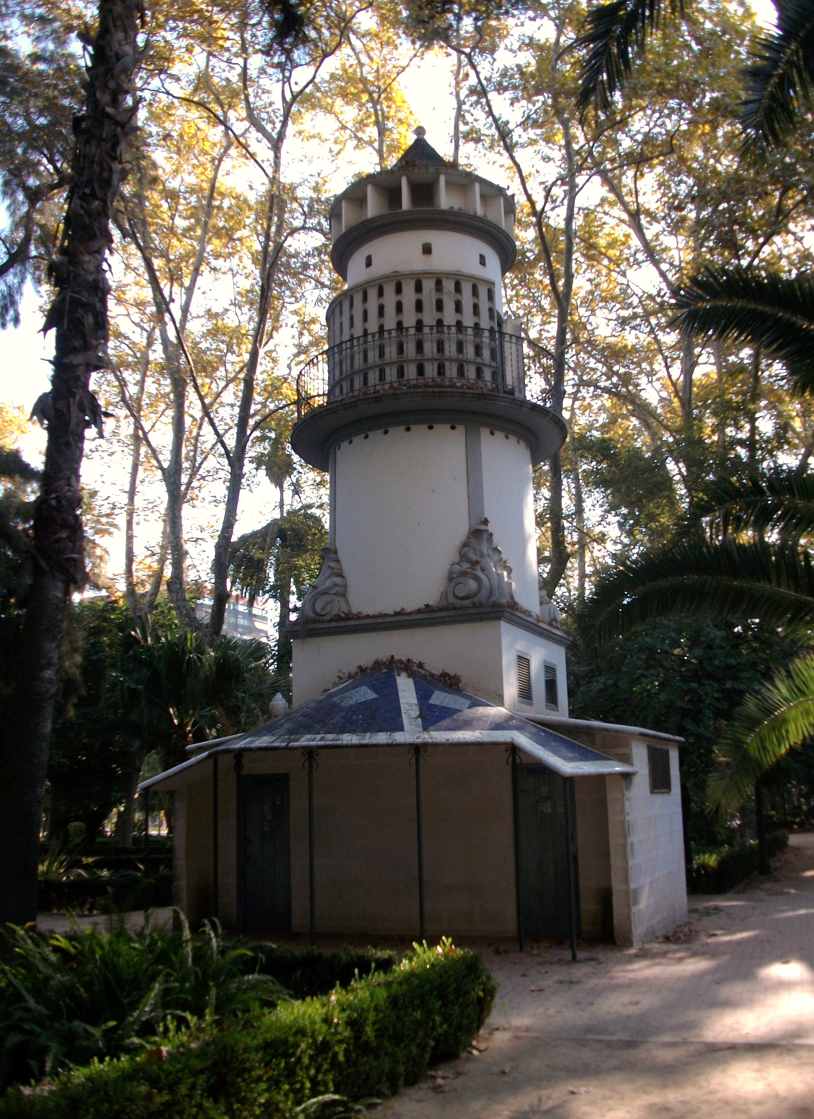 Colomer del parc Ribalta, Castelló.